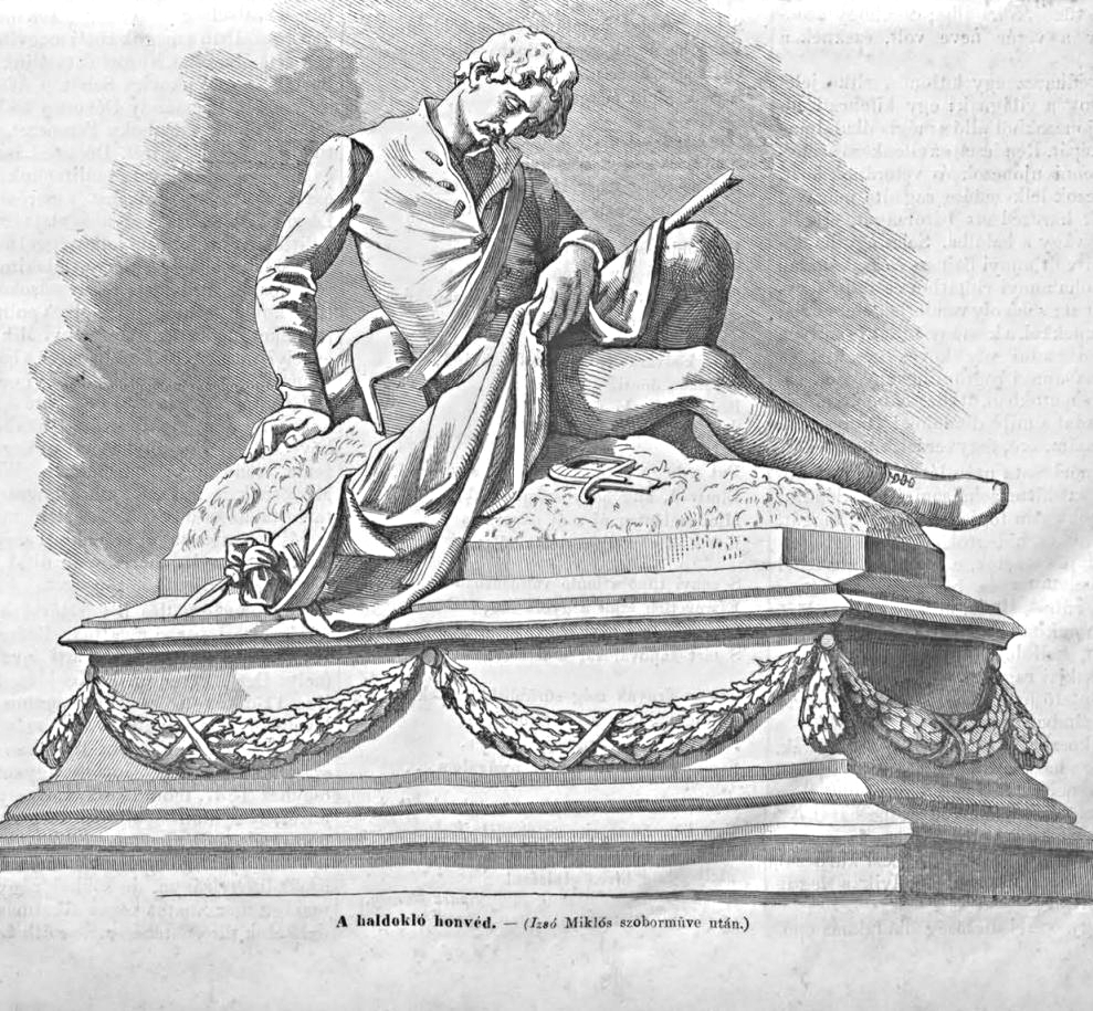 A Vasárnapi Újság illusztrációja Izsó Miklós szobrászművész Haldokló honvéd című alkotásáról